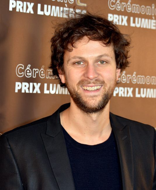 Pierre Rochefort à la cérémonie des prix Lumières